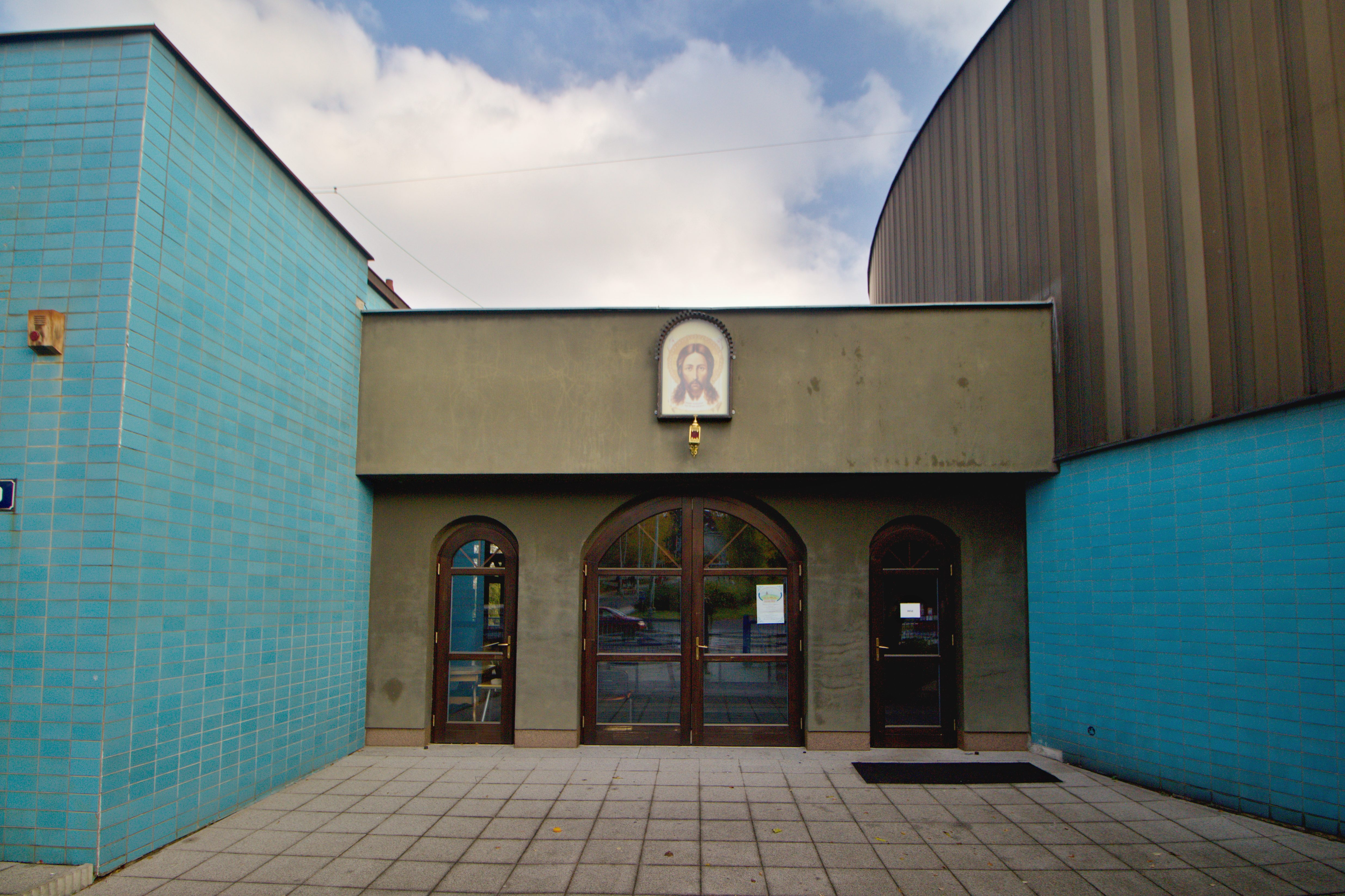 Praha 6-Bubeneč, pravoslavný chrám sv. Ludmily